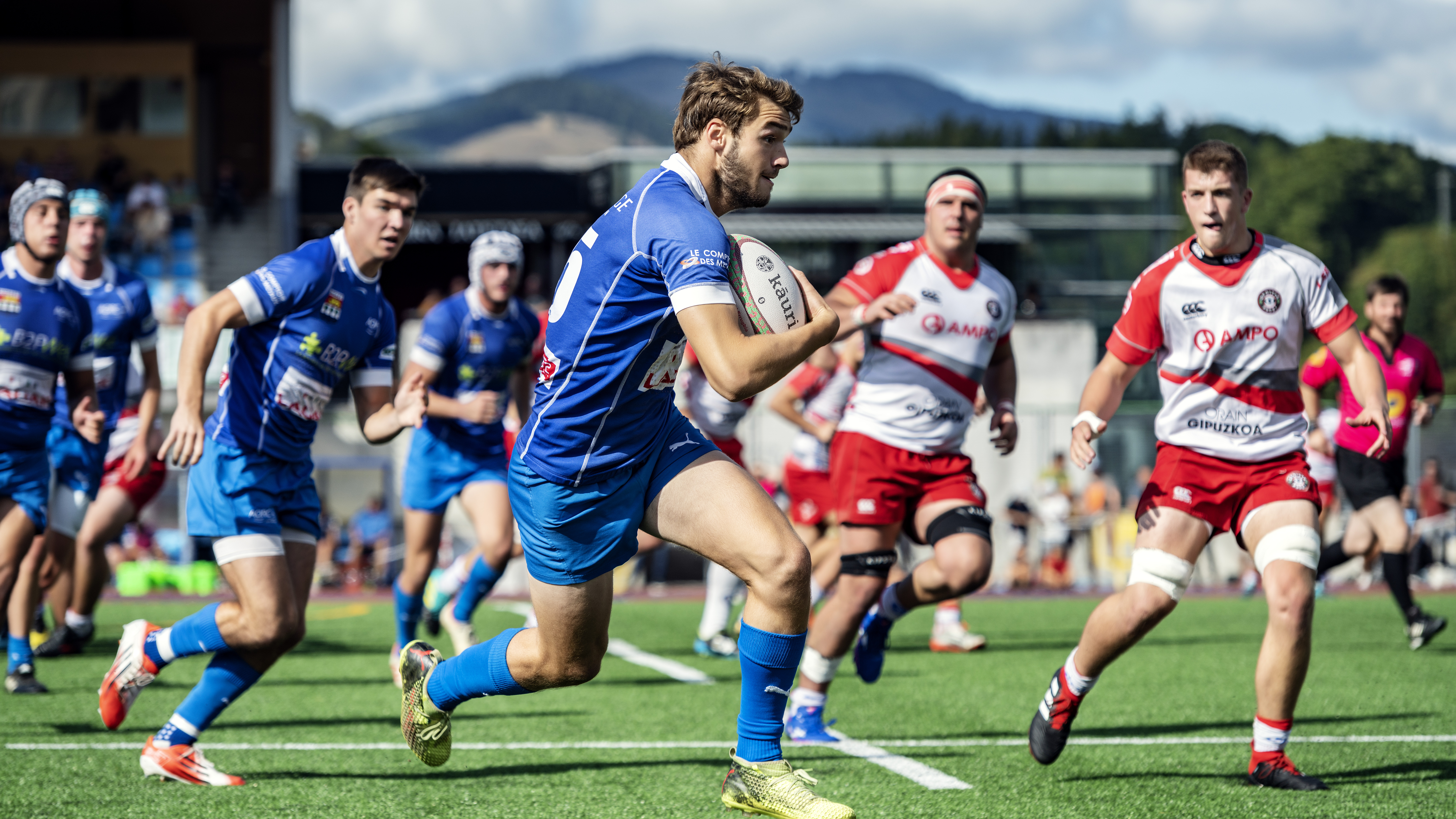 Aviron Bayonnais izan da Euro Basque Rugby Challenge-Euskal Errugbi Ligaren lehen txapelduna